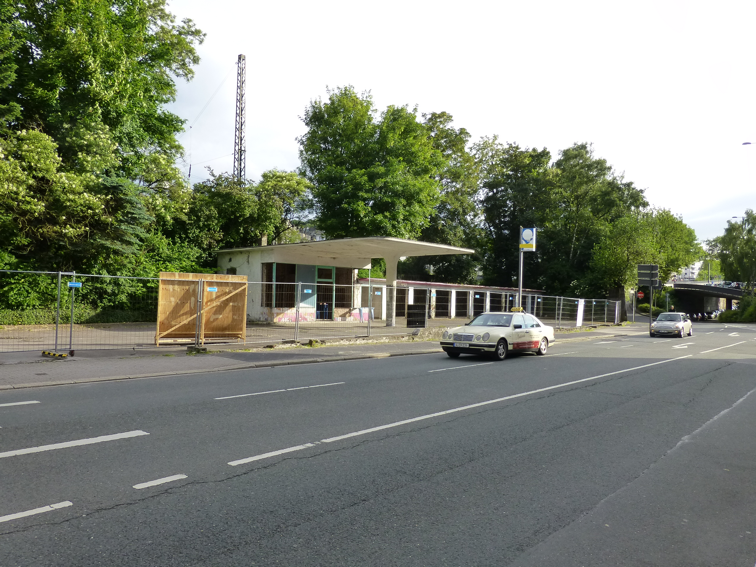 Wittensteinstraße, Wuppertal